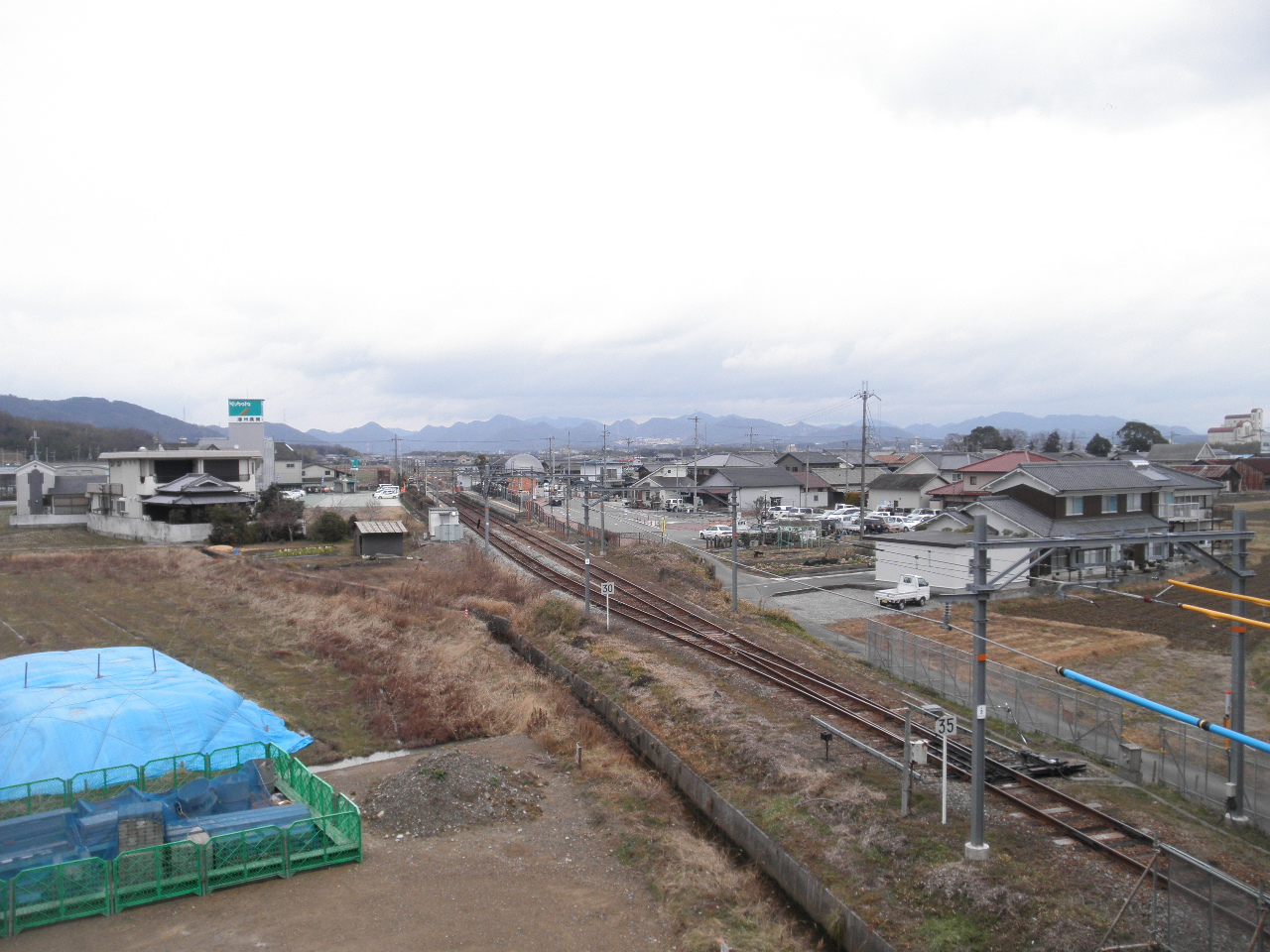 兵庫県加東市河高 JR加古川線